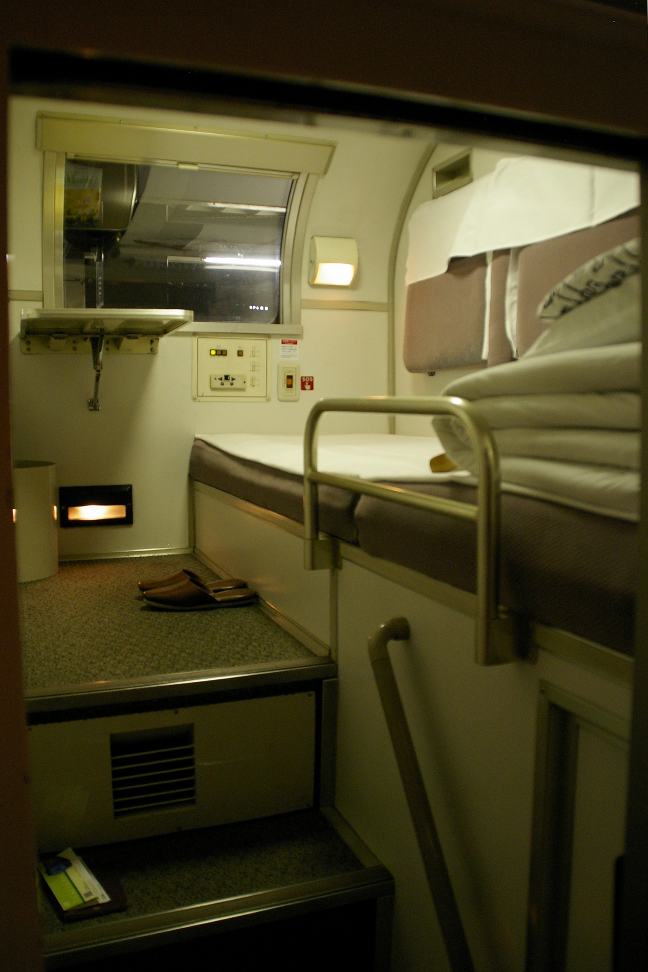 Einzelzimmer in der Klasse B